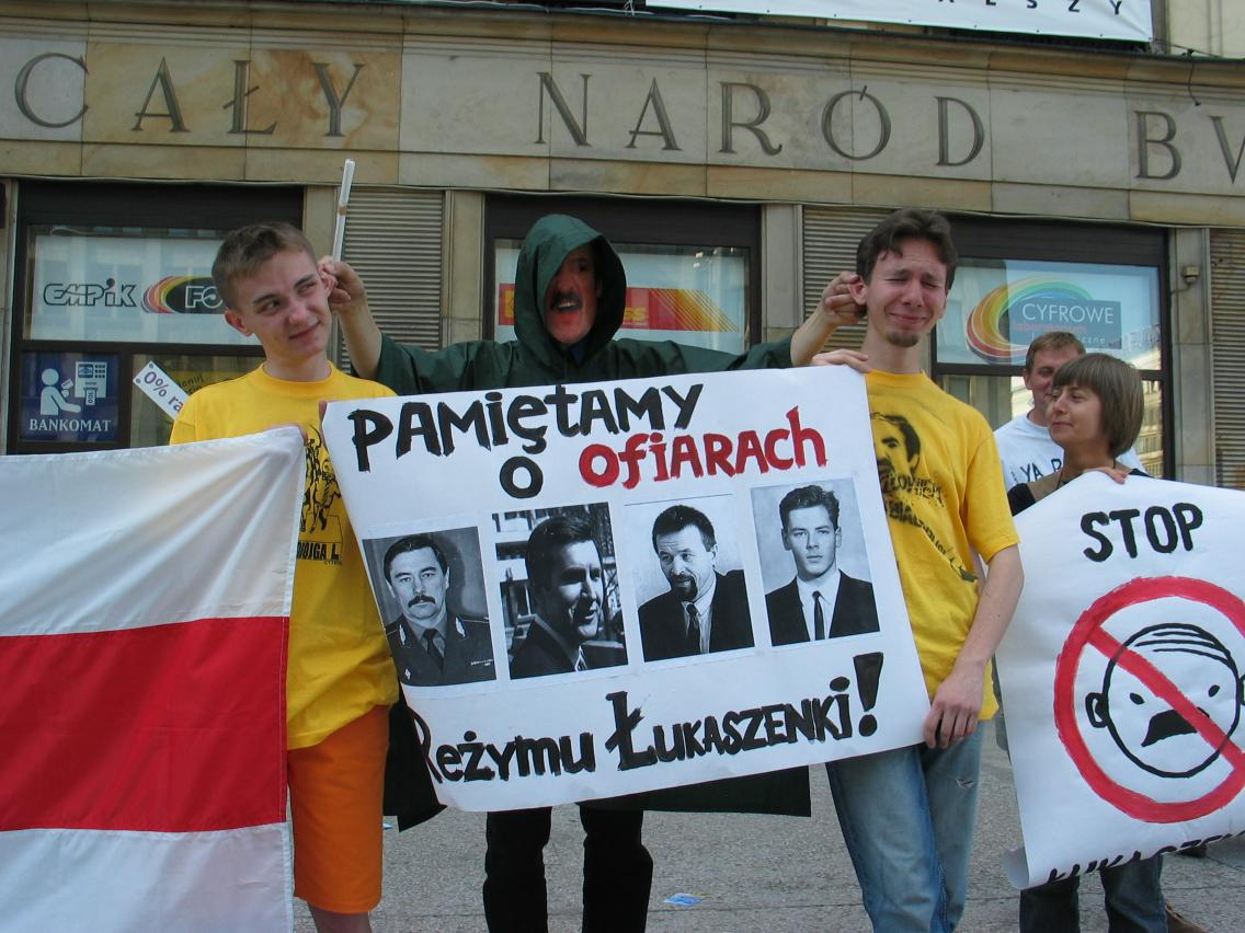 Happening "Pan tak samo może zniknąć!" w Warszawie, przypominający o zaginięciach opozycjonistów na Białorusi.